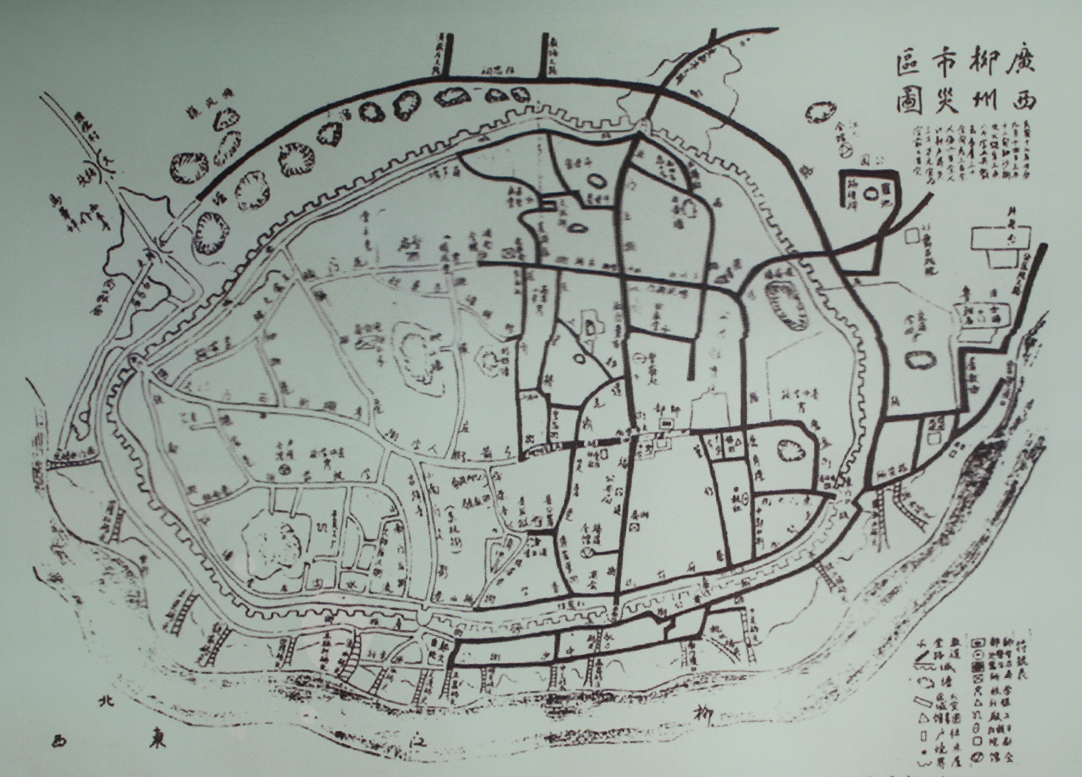 1928年“火烧半边城”灾情之后柳州城区图，柳州市城市规划馆